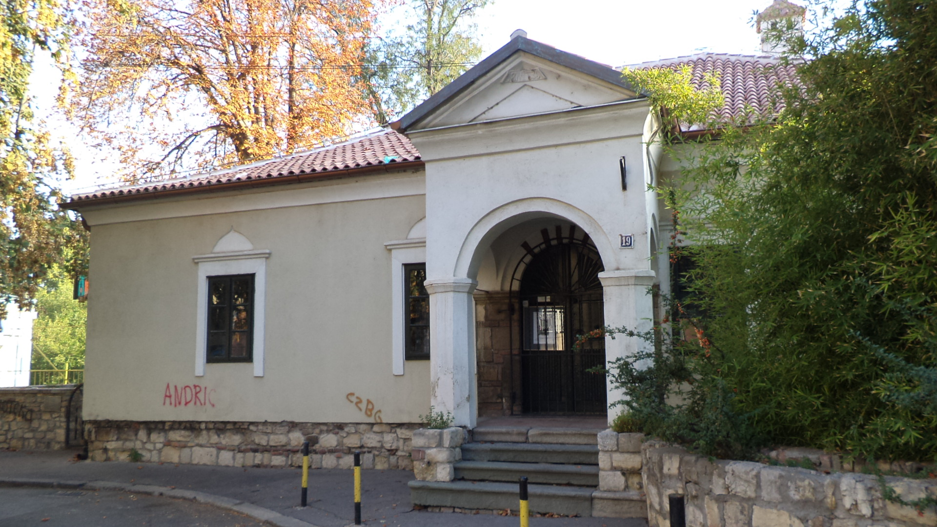 Божићева кућа